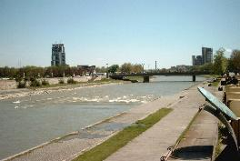 Skopje3 ved Vardar den 19 04 2005